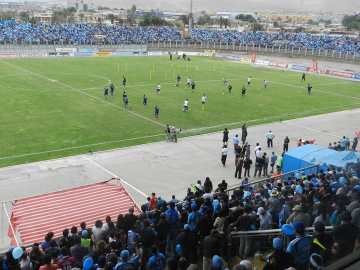 Estadio Carlos Dittborn de Arica